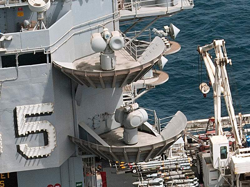 Две РЛС подсветки цели Mk 95 (в центре, одна над другой) ЗРК «Си Спарроу» на авианосце CVN-65 «Энтерпрайз». Антенна с выпулклым радиопрозрачным колпаком — передающая, с вогнутым — приёмная, посередине между ними — оптический визир.